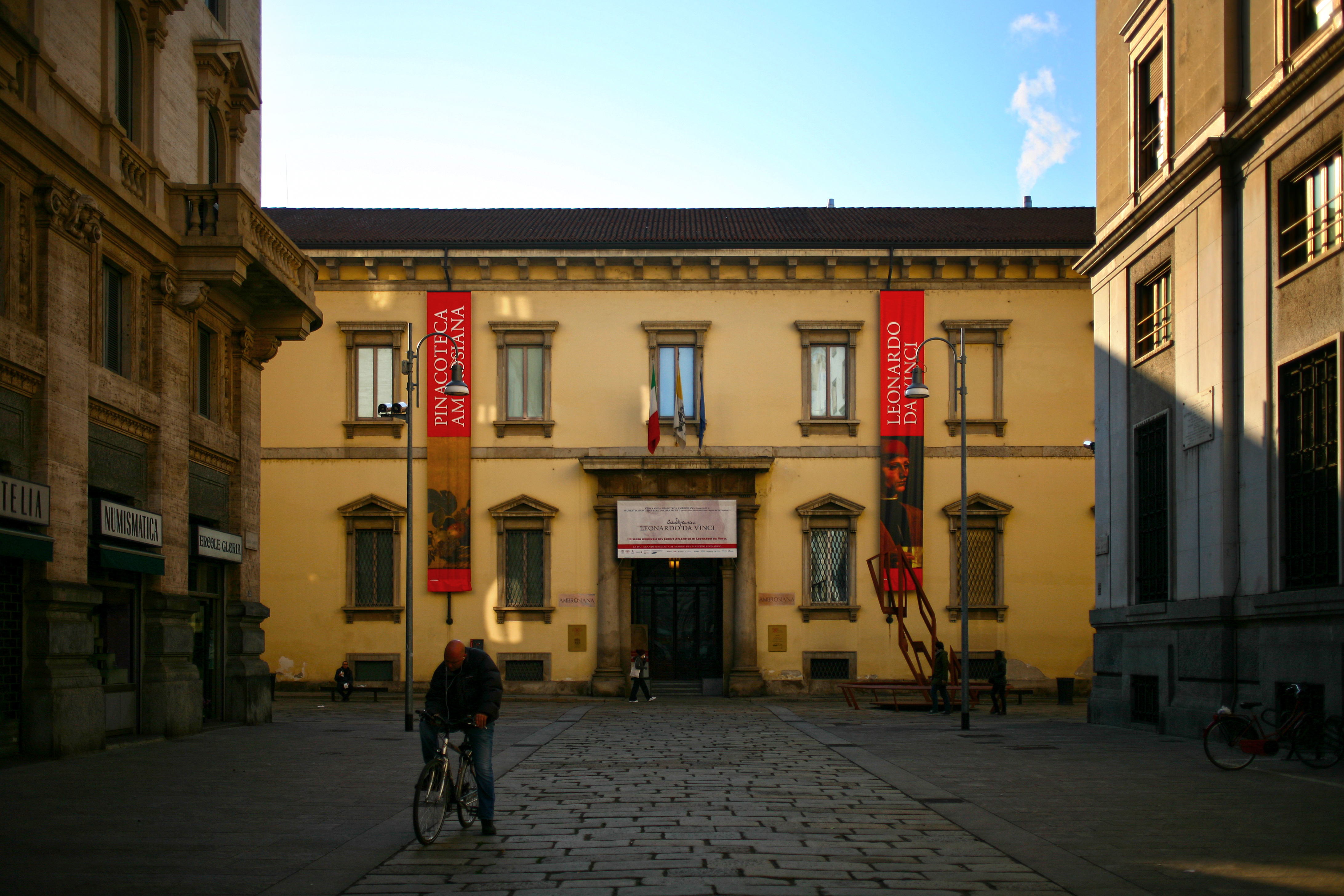 Biblioteca Ambrosiana facciata pincipale verso piazza dei Mercanti (Milano)